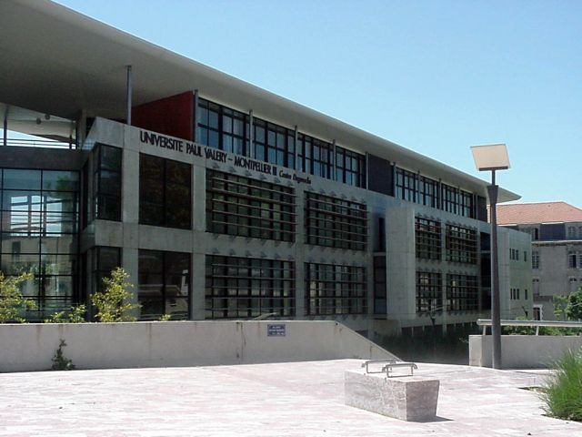 Antenne de l'Université Paul Valéry à Béziers. Photographie personnelle prise en mai 2004